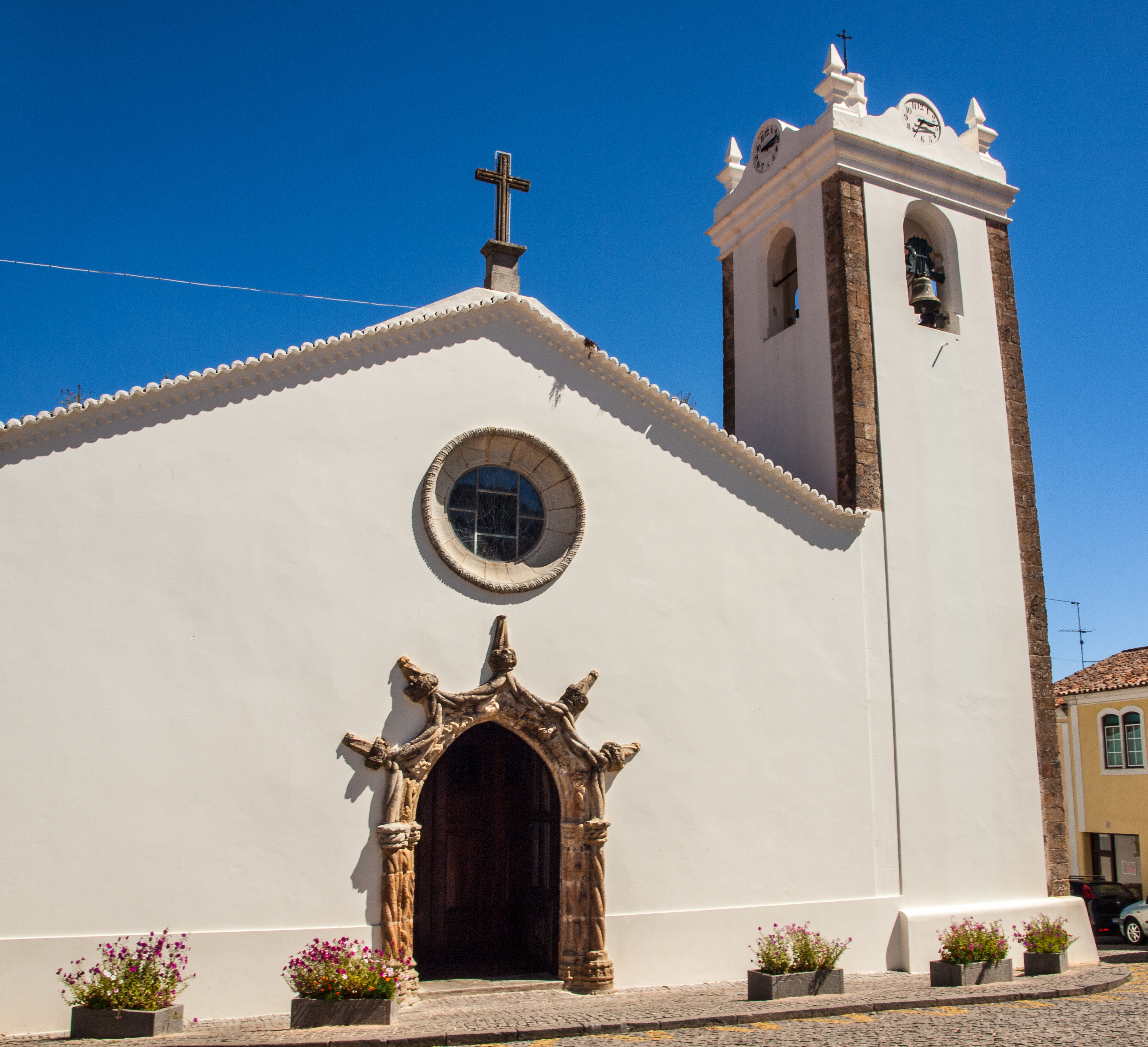 Portugal 2012